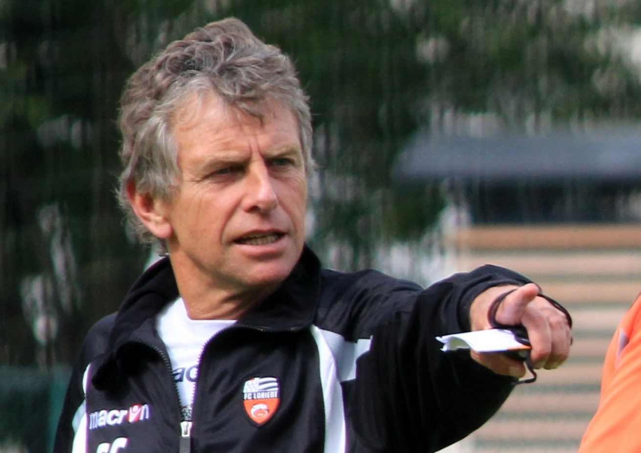 Christian Gourcuff lors de la reprise de l'entrainement du FC Lorient le 27 juin 2013